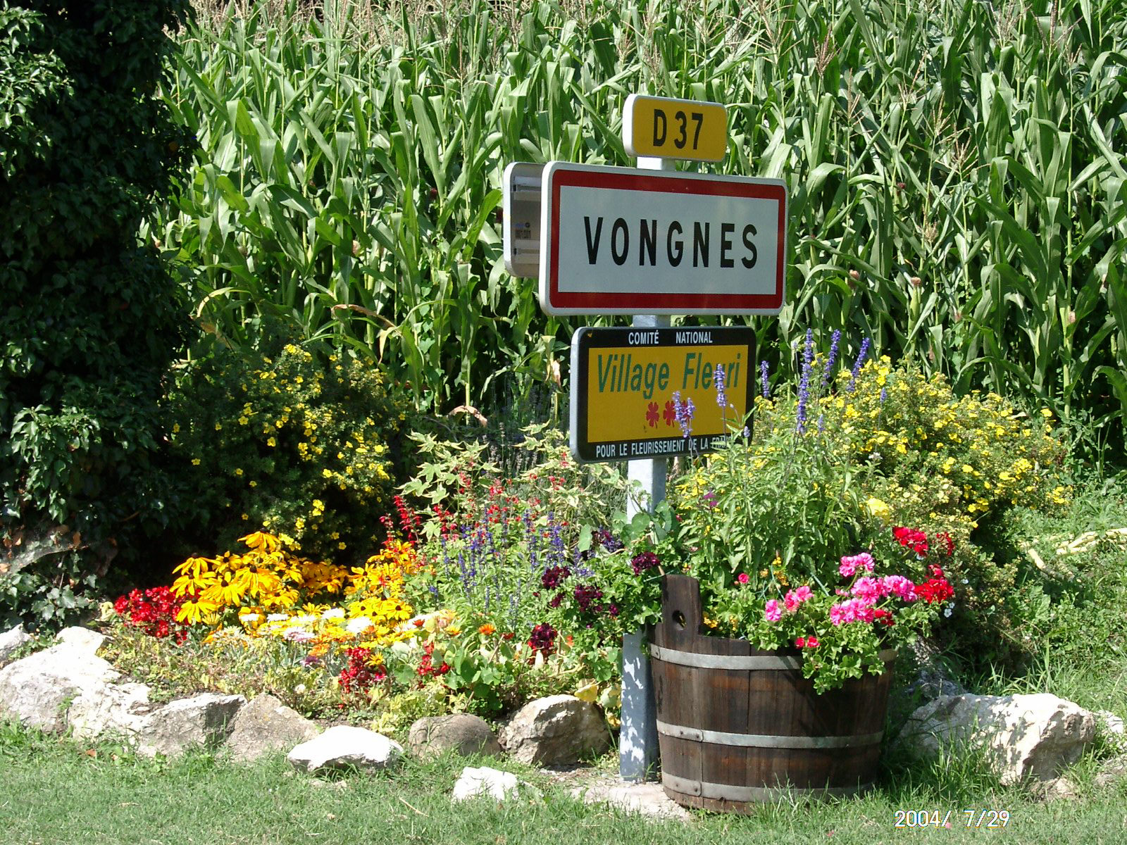 Vongnes, village fleuri, possède actuellement trois Fleurs au concours national des villes et villages fleuris.